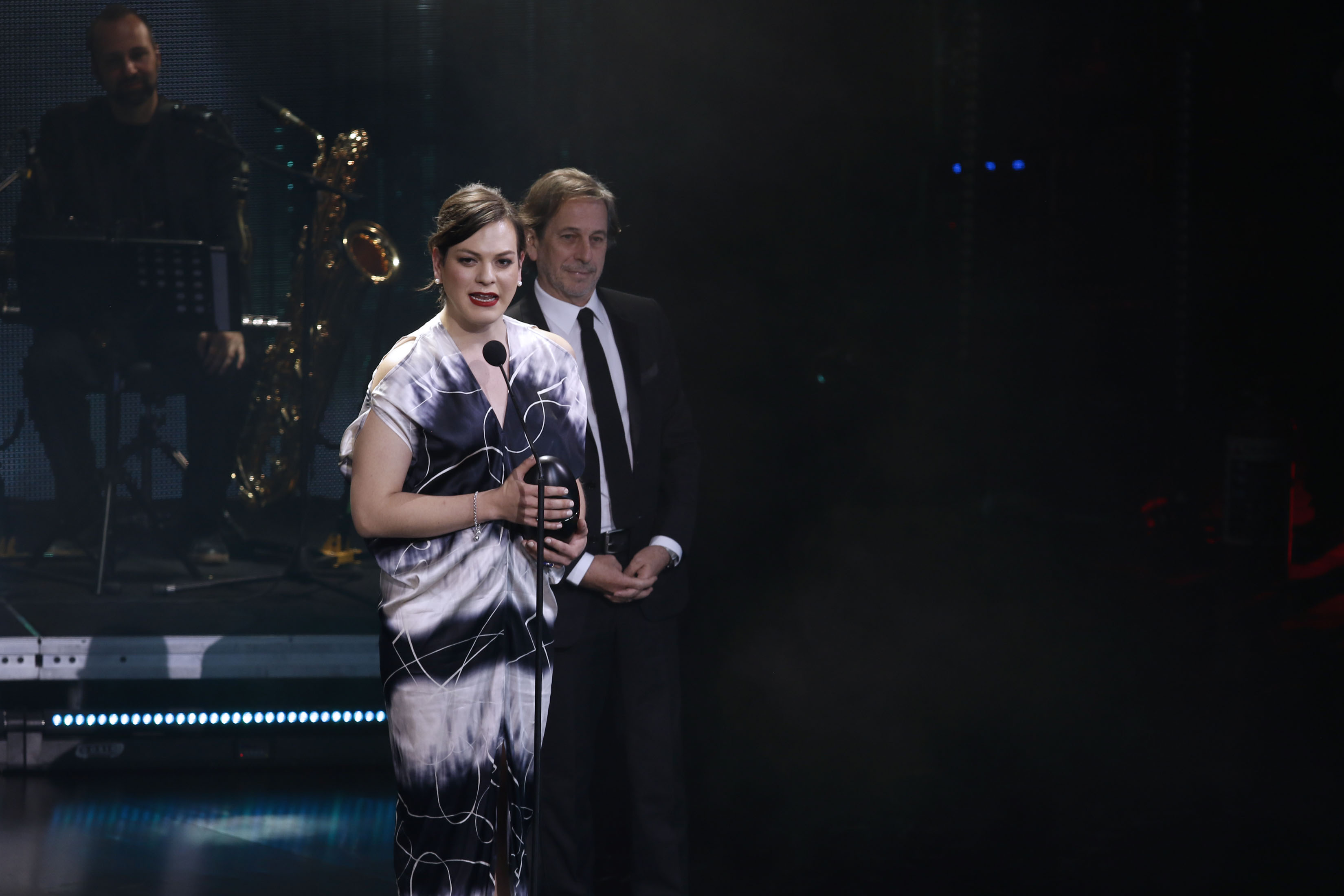 Miércoles 6 de diciembre de 2017 En el Teatro de la Ciudad Esperanza Iris, se realizó la 4ª Entrega del Premio Iberoamericano de Cine, Fénix. Daniela Vega, Mejor Actuación Femenina, por “Una mujer fantástica”Fotografía: Milton Martínez / Secretaría de Cultura CDMX